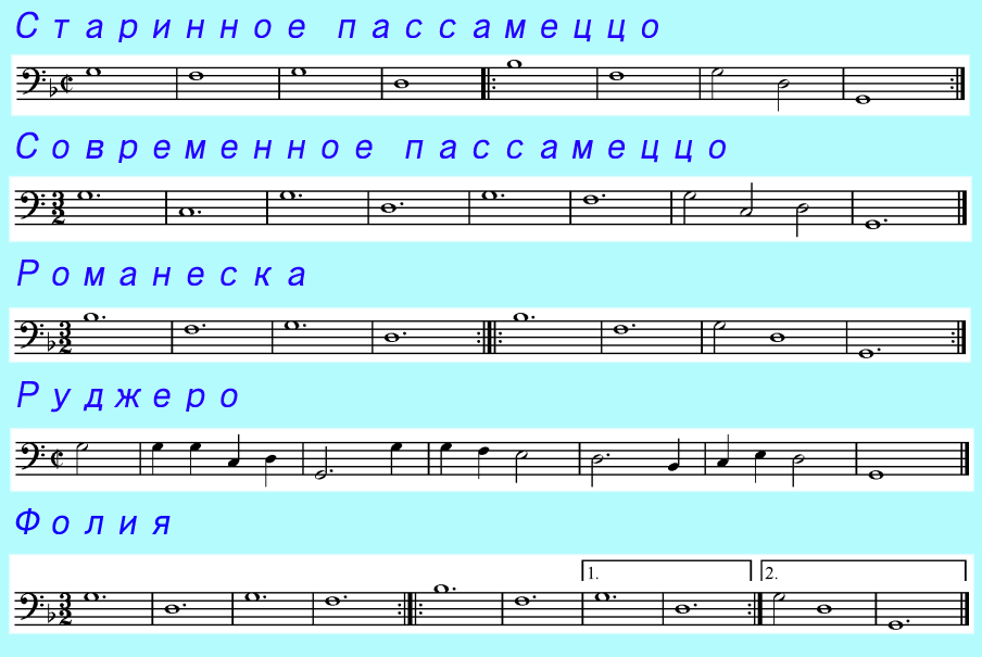 Пять стандартных остинатных линий, повсеместно использовавшихся для вариаций танцевальной музыки в XVI веке